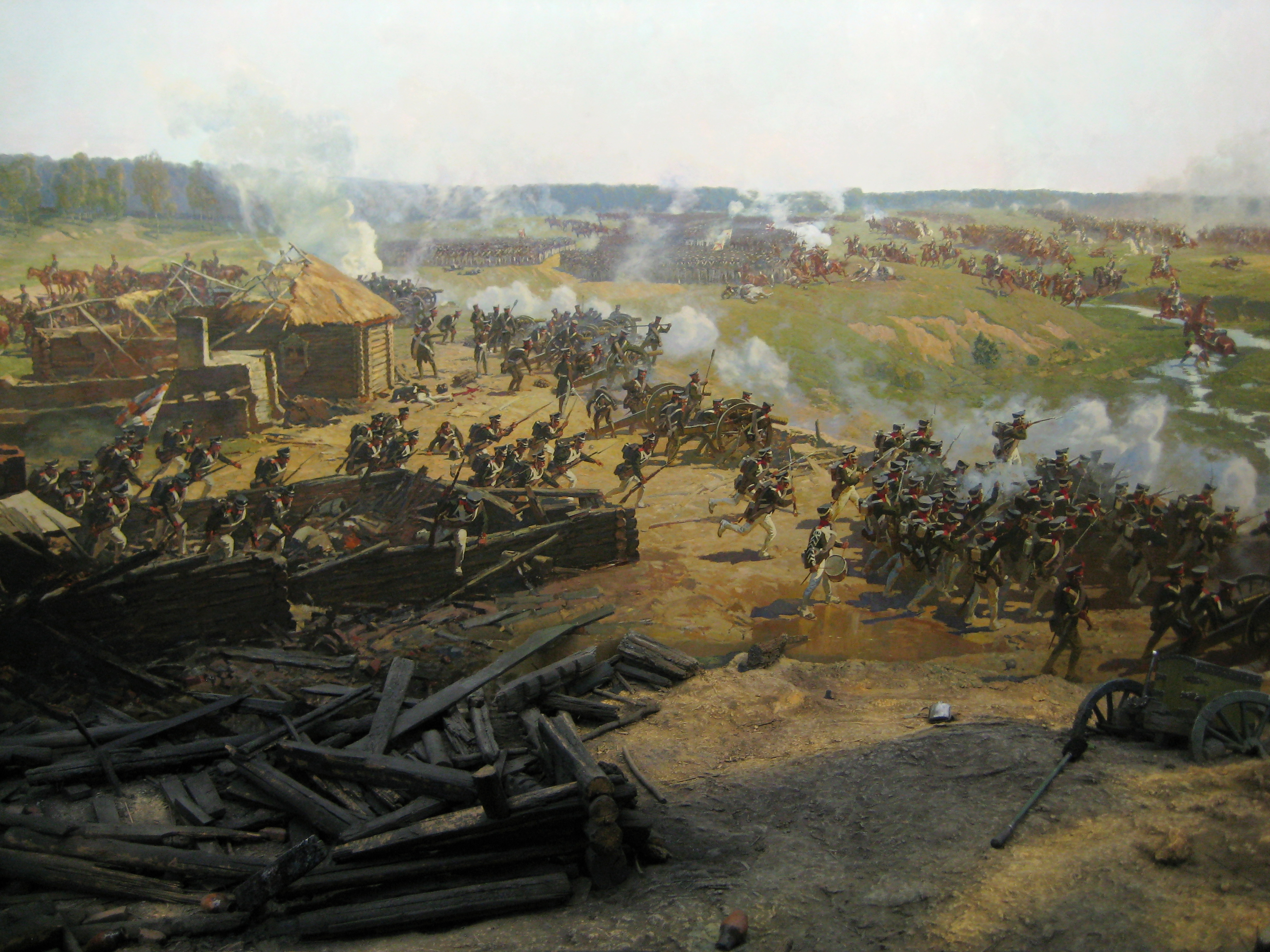 Музей "Бородинская панорама". Вид панорамы